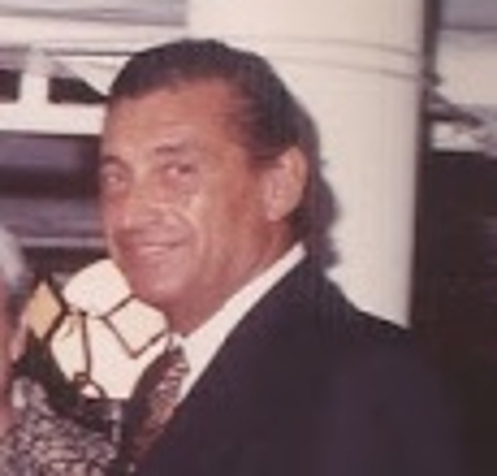 Néstor Ahuad, gobernador de La Pampa entre 1987 y 1991.